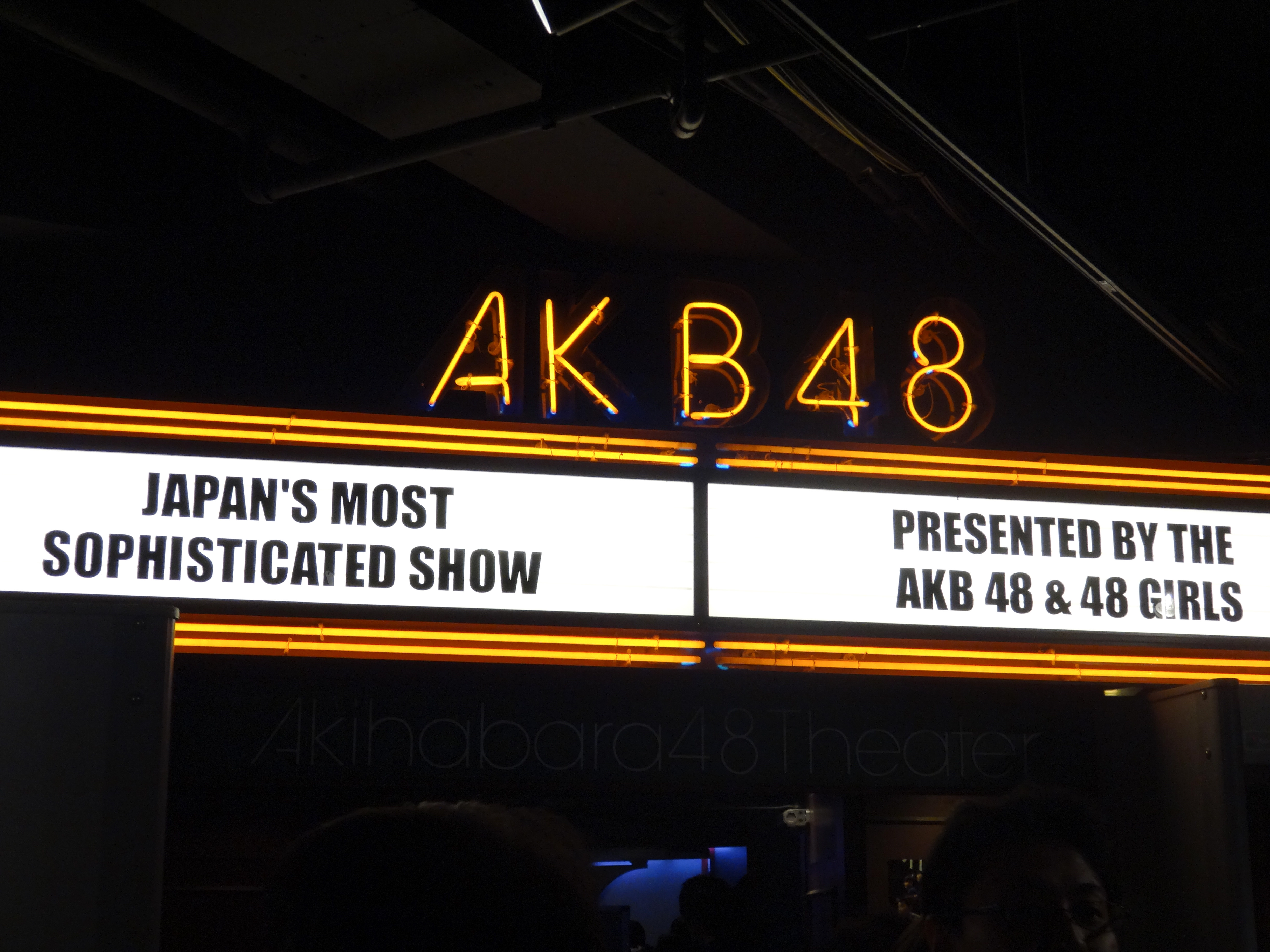 AKB48劇場 AKB48 ステージファイター 特別劇場公演 2014